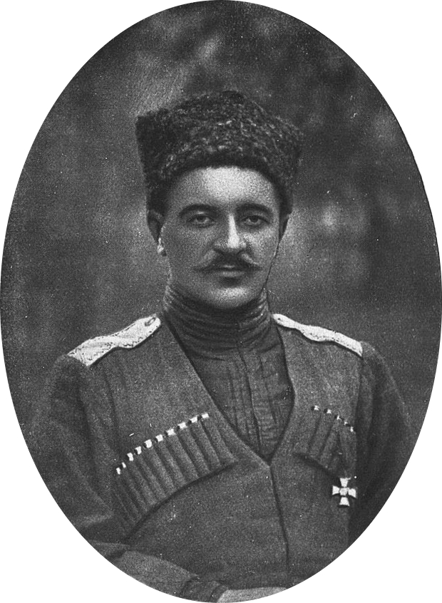 Виктор Леонидович Покровский, георгиевский кавалер, участник Белого движения, генерал-лейтенант.